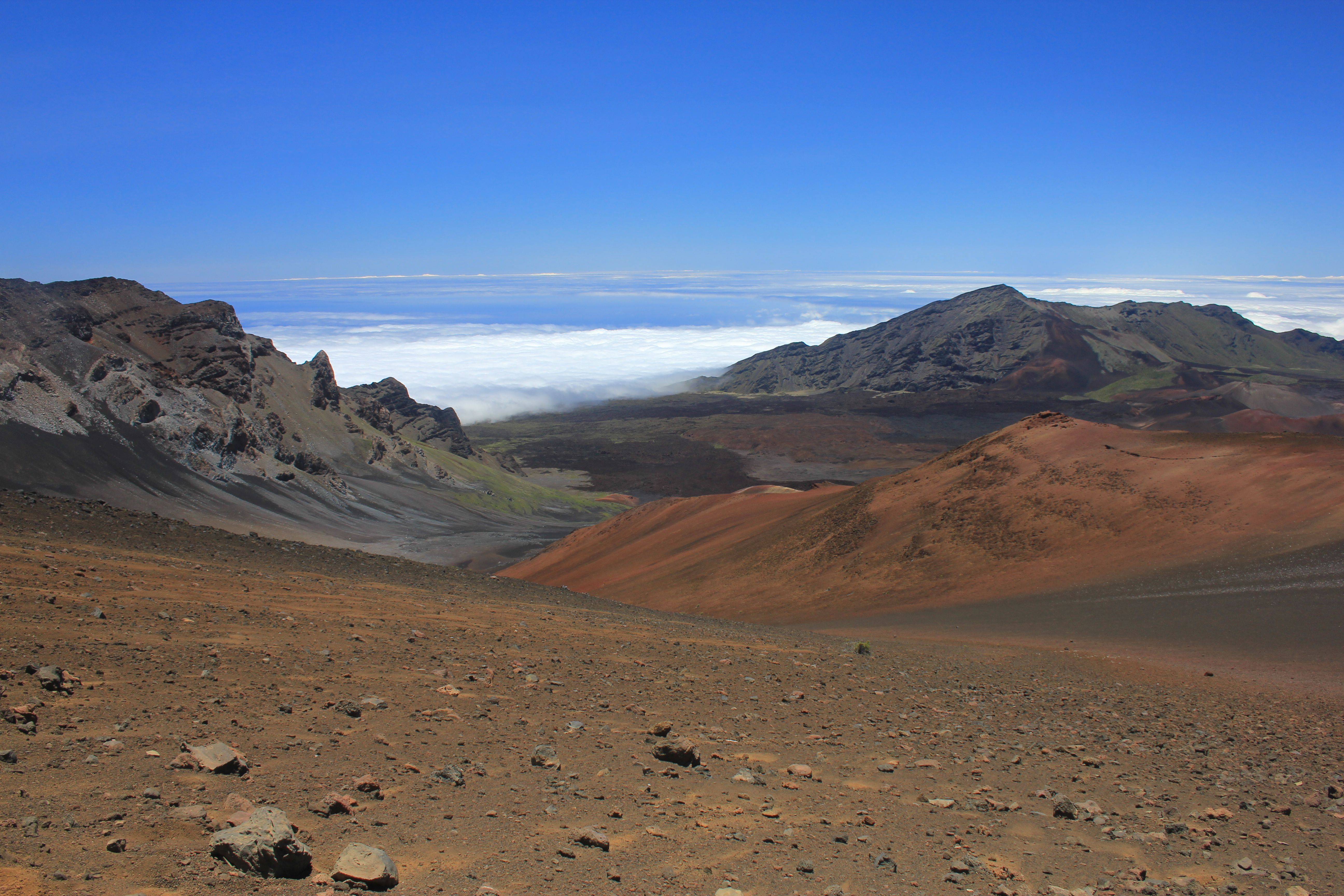 Sliding sands trail, Haleakala, Maui